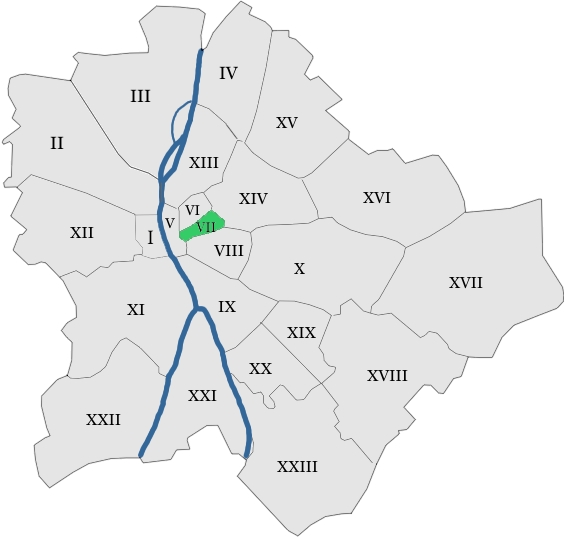 map hungary budapest district 7